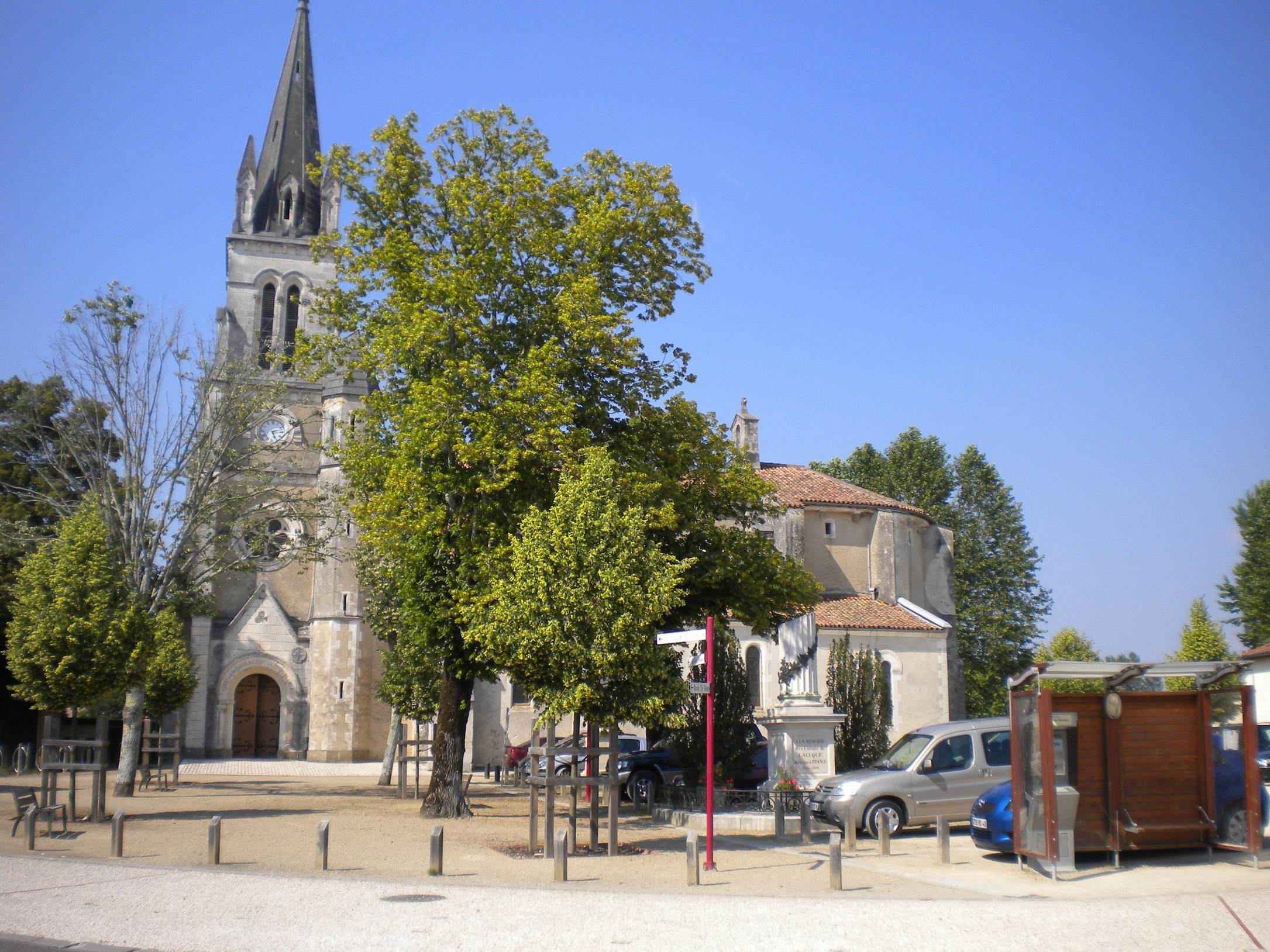 Photo du centre de Laluque. Photo prise le samedi 26 Juin 2010, vers 17h00.